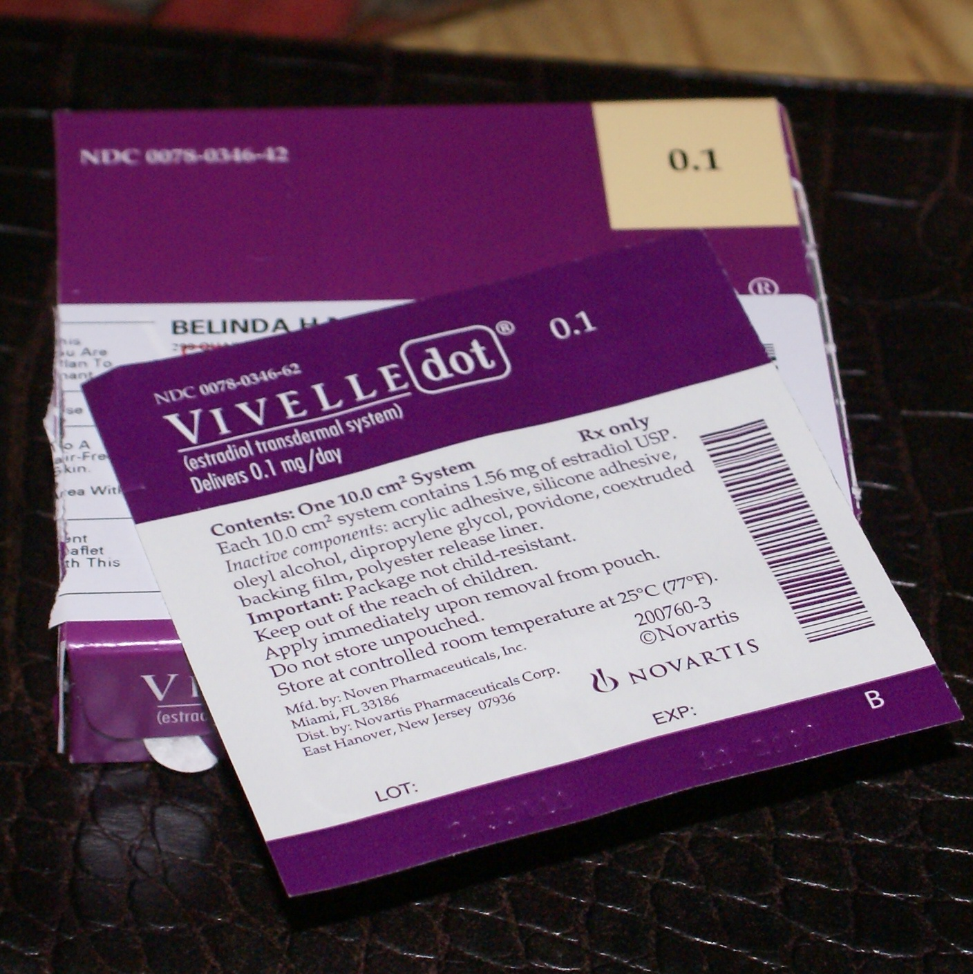 Vivelle-dot, an estrogen patch.